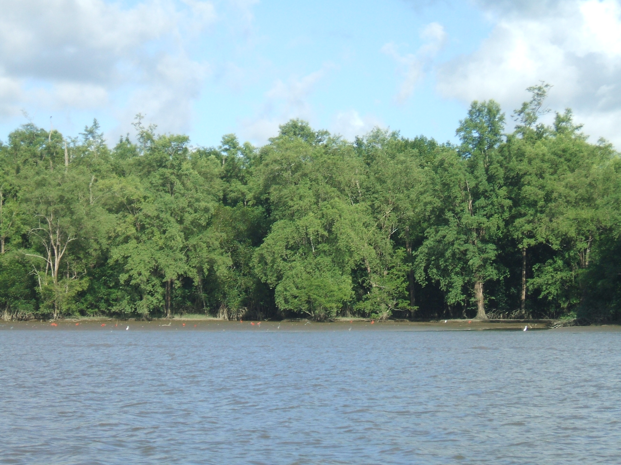 manguezal de siriúba - Avicennia schaueriana, com revoada de pássaros, guarás, garças e colhelheiros